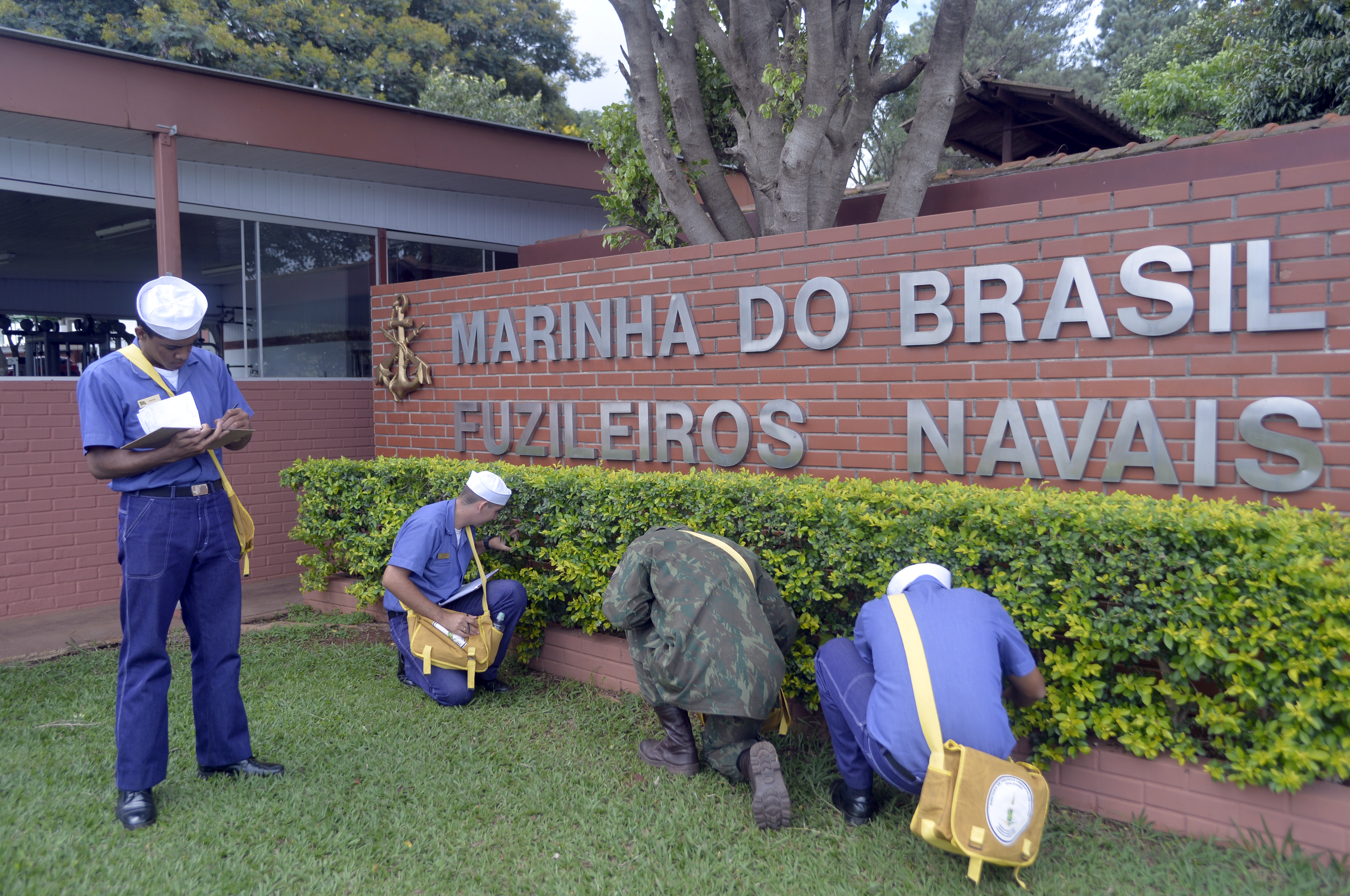 29/01/2016, Brasília - DF Fotos: Gilberto Alves